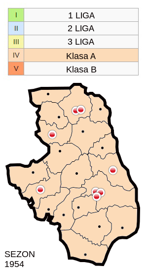 Jagiellonia w sezonie 1954 - mapa klubów